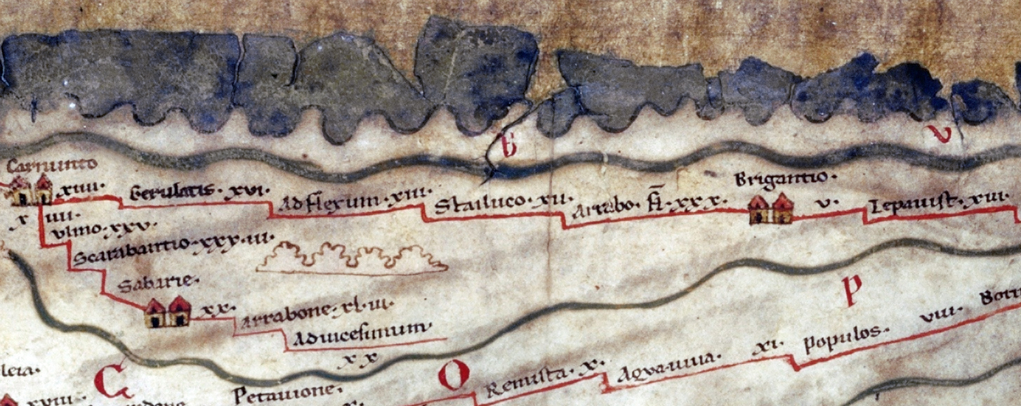 Tabula Peutingeriana: Limesstraße zwischen Carnuntum und Lepauist.